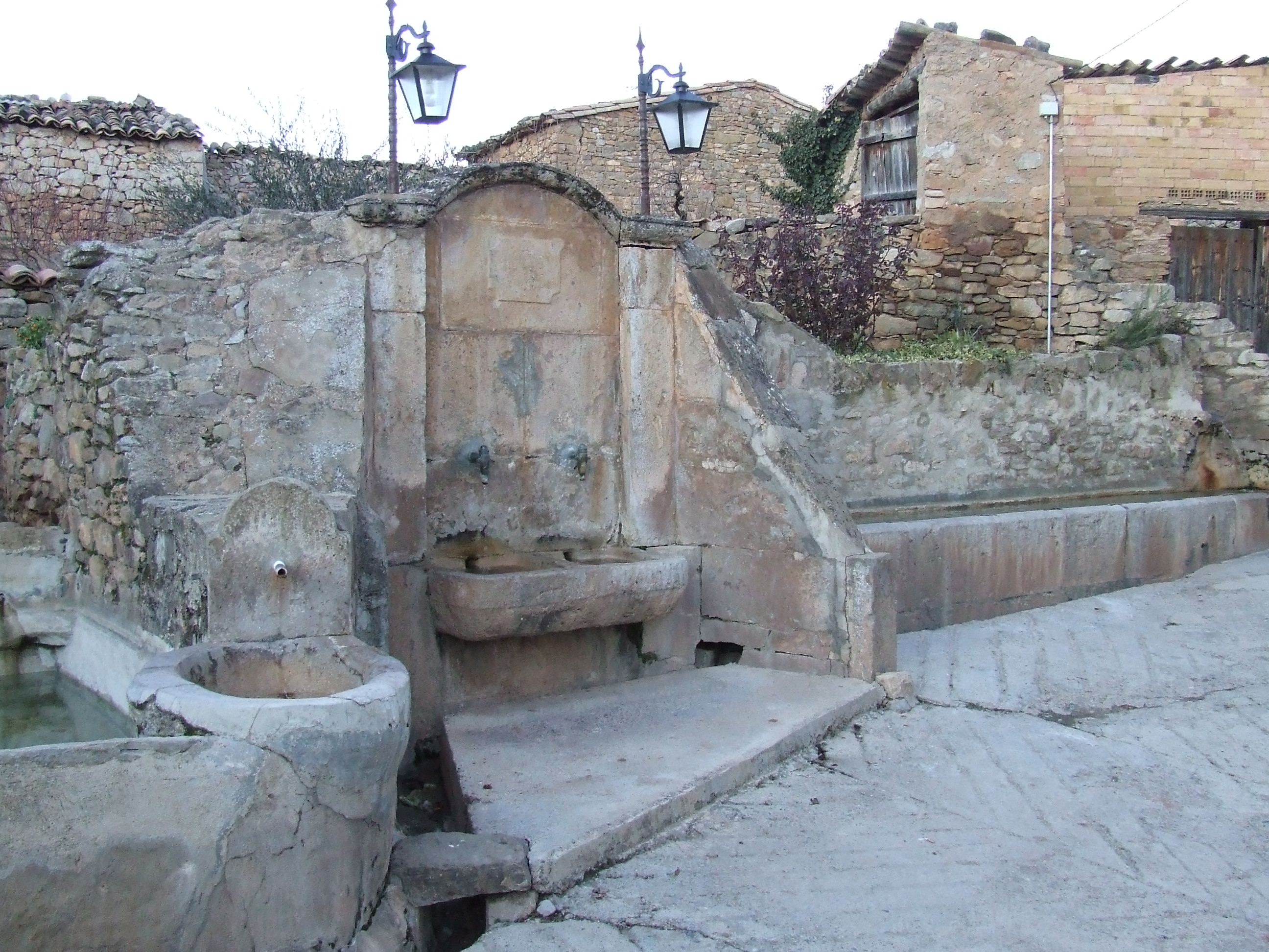 Font pública, abeuradors i safareigs de Suterranya (Tremp, Pallars Jussà)